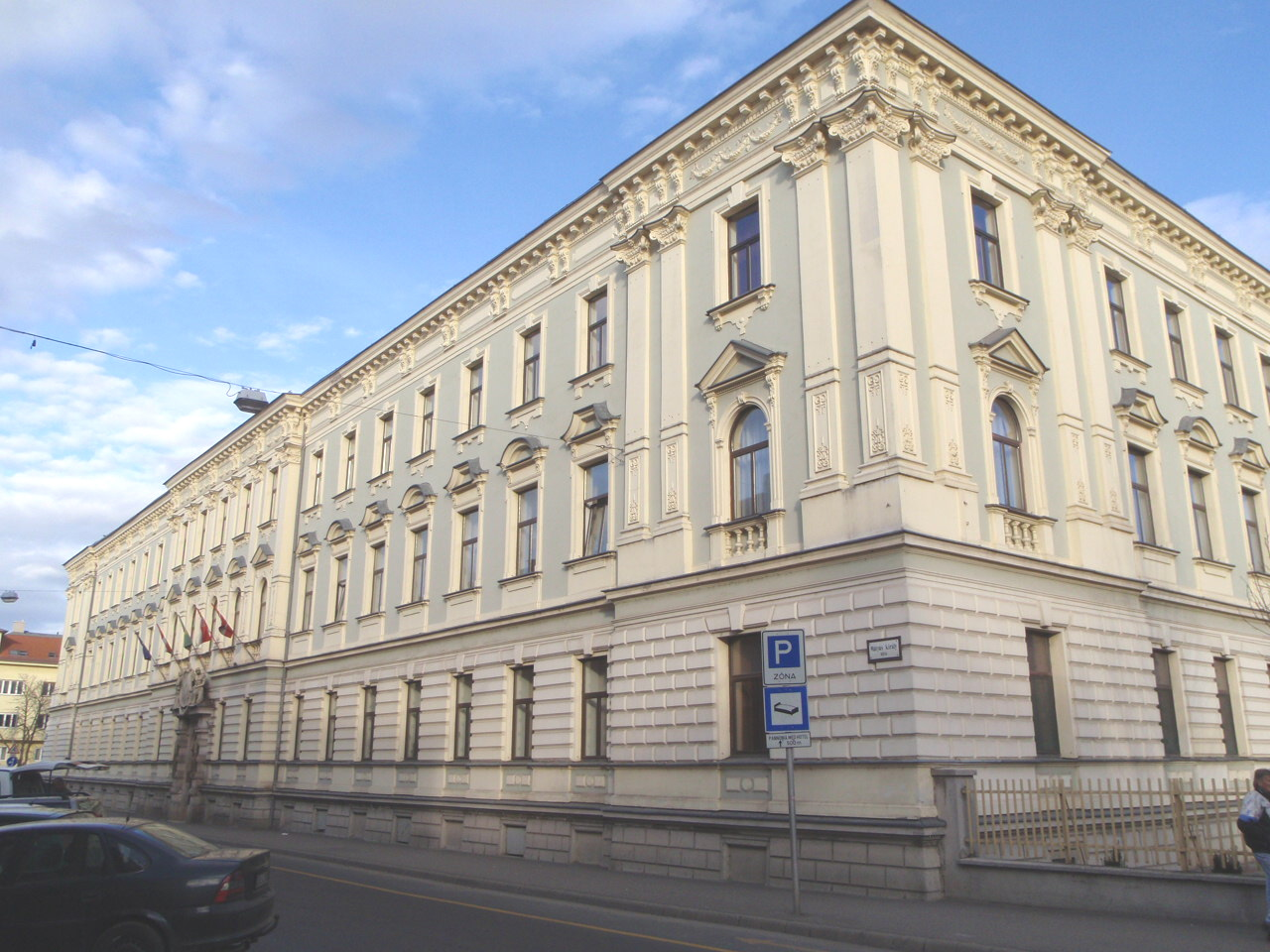 GYSEV Székház, Mátyás király utca